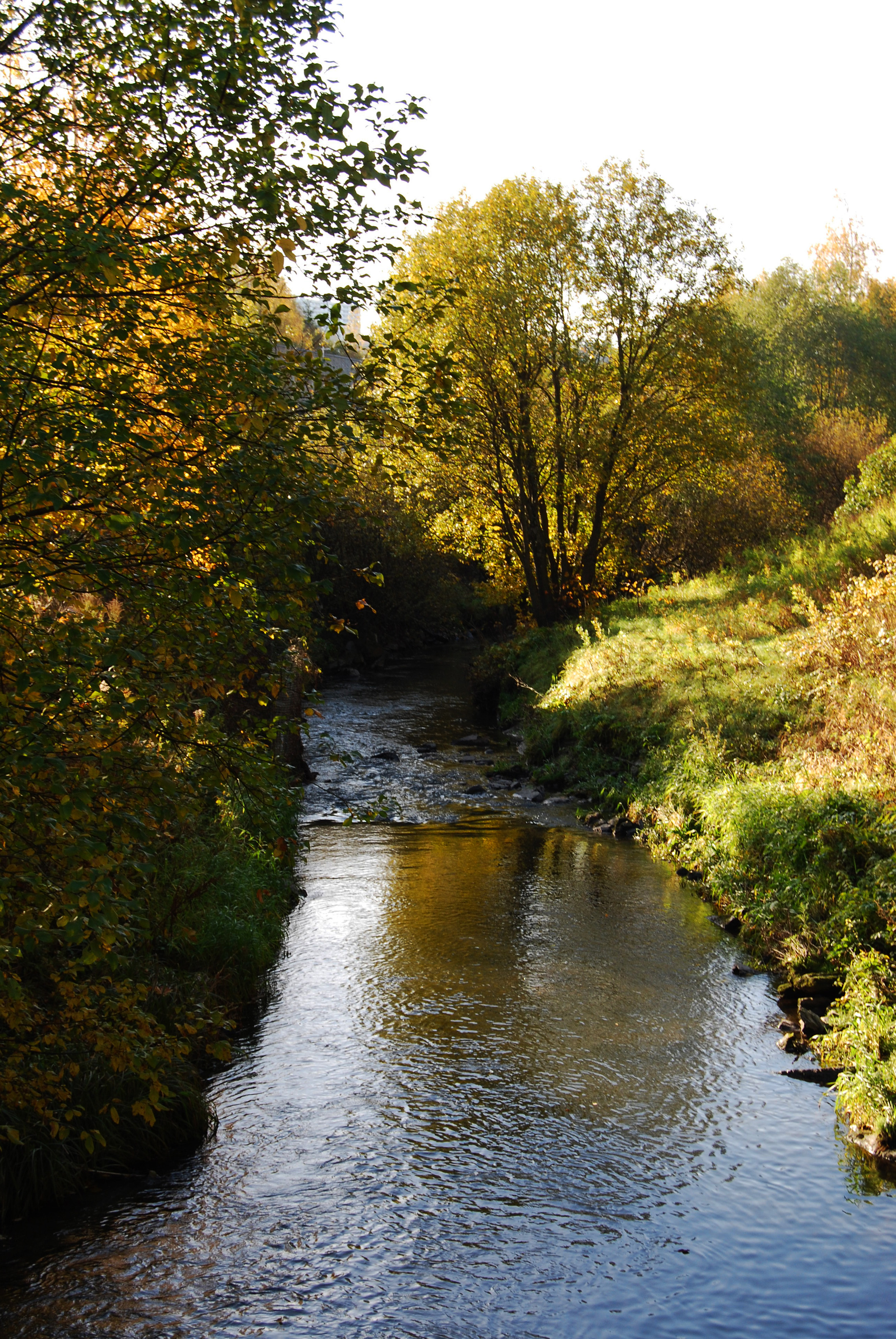 Alnaelva. Bildet er tatt på Alnabru, mellom Terminalveien og Vollaveien.